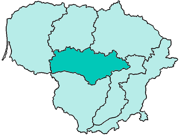 Mappa dell'arcidiocesi cattolica di Kaunas, in Lituania.